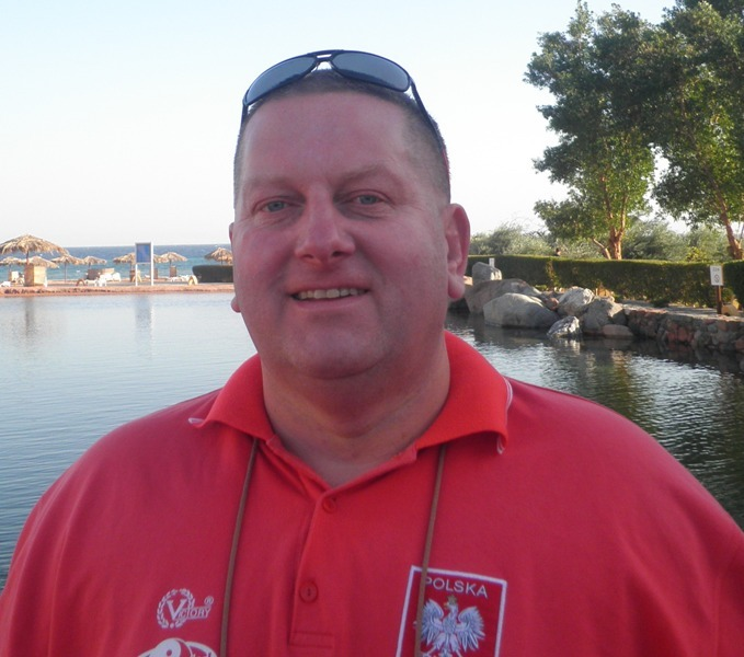 Wiesław Koluch